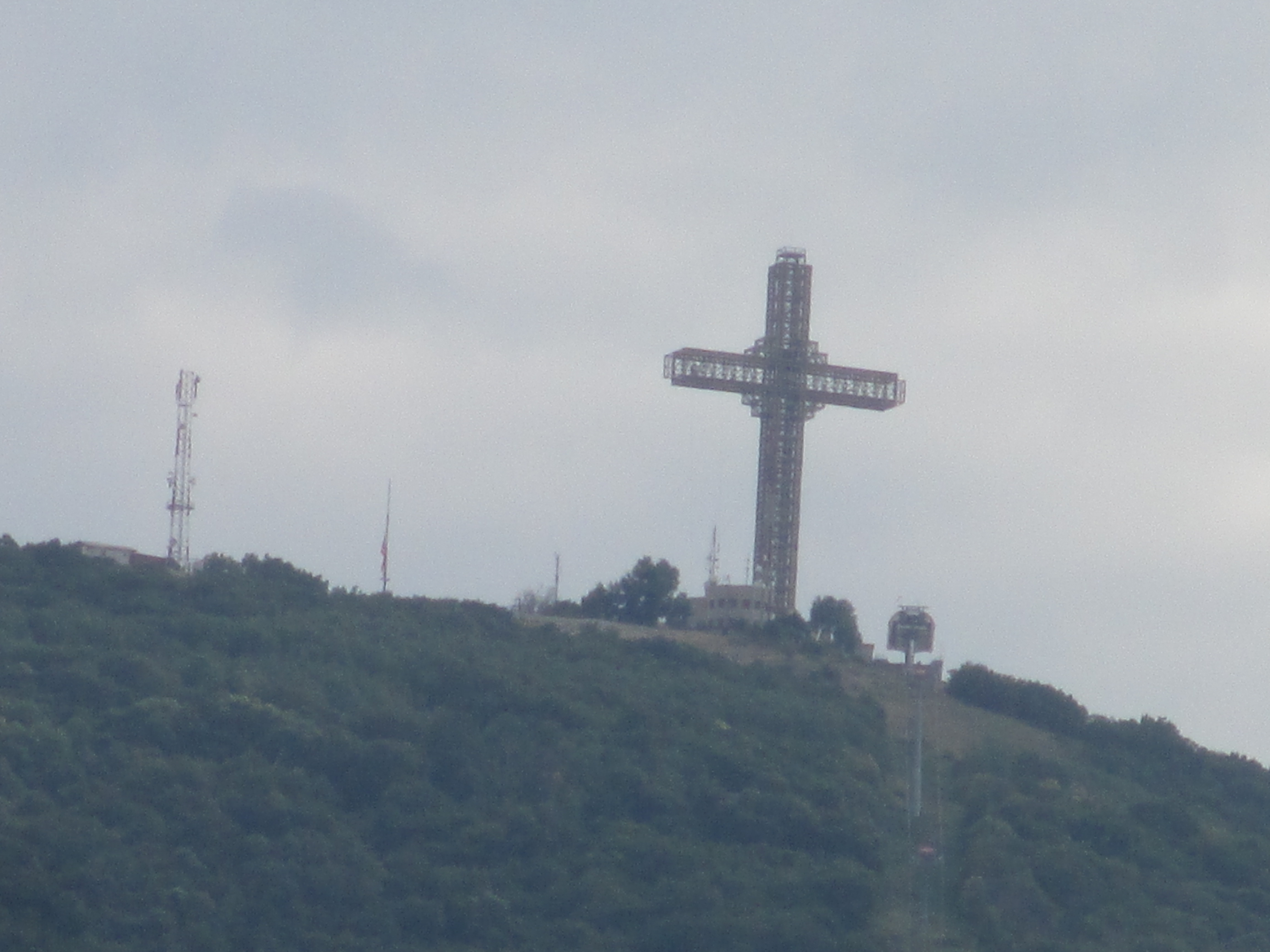 צלב המילניום ליד סקופיה